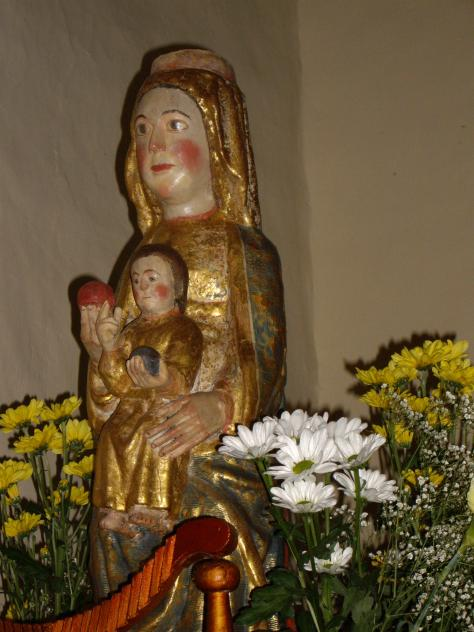 Reliquia religiosa de Barceo. Patrona de la pedanía de Barceo. Talla de madera de una sola pieza, policromática; fechada en el siglo XII.